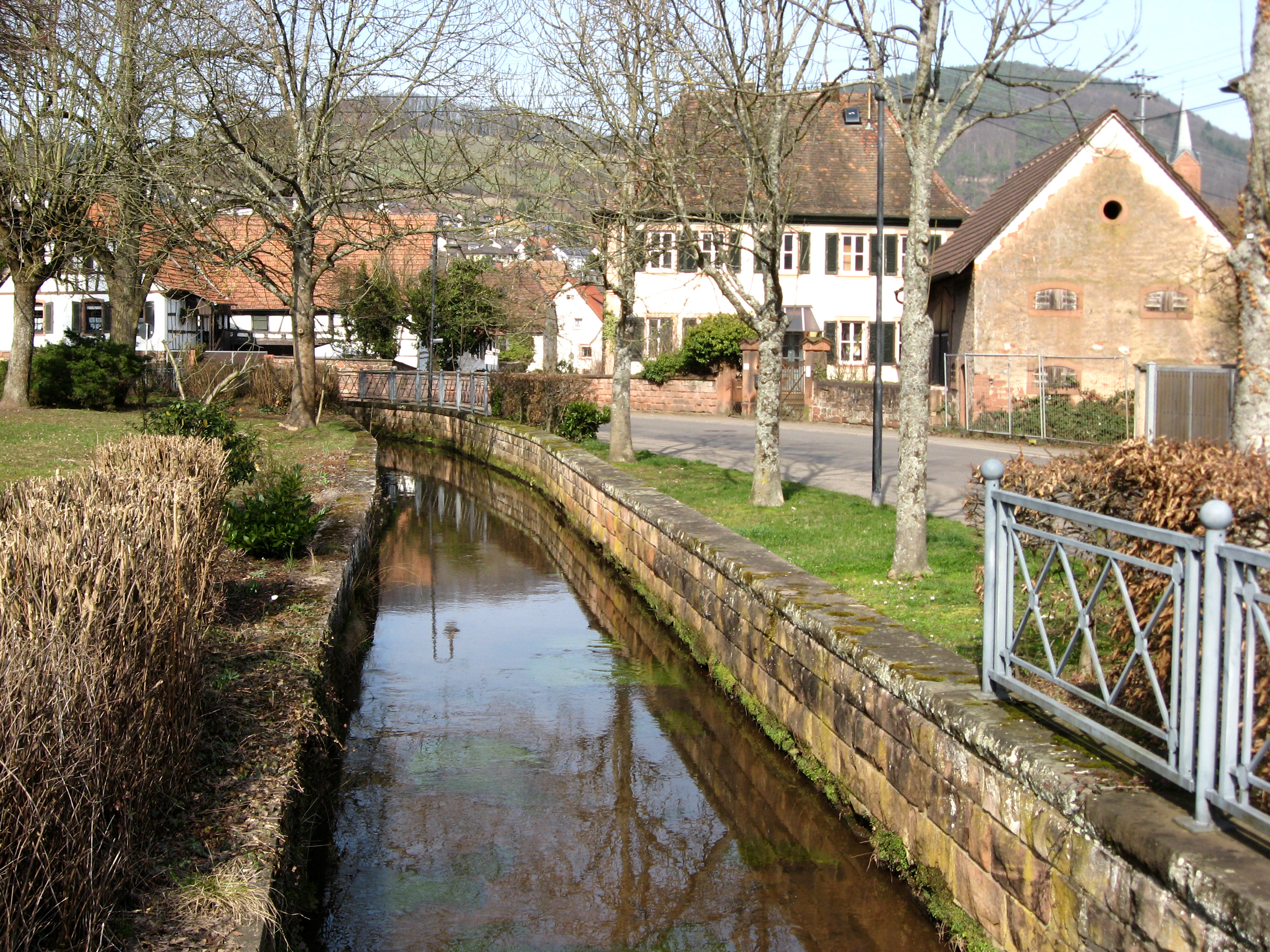 Albersweilerer Kanal; zwischen der Straße Am Kanal und Weinstraße in Albersweiler; im Hintergrund der protestantische Pfarrhof